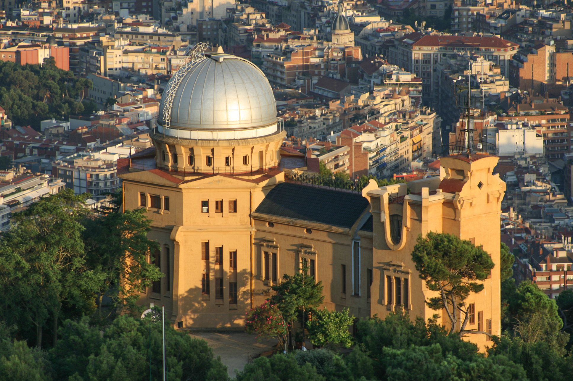 Vista de l'Observatori Fabra